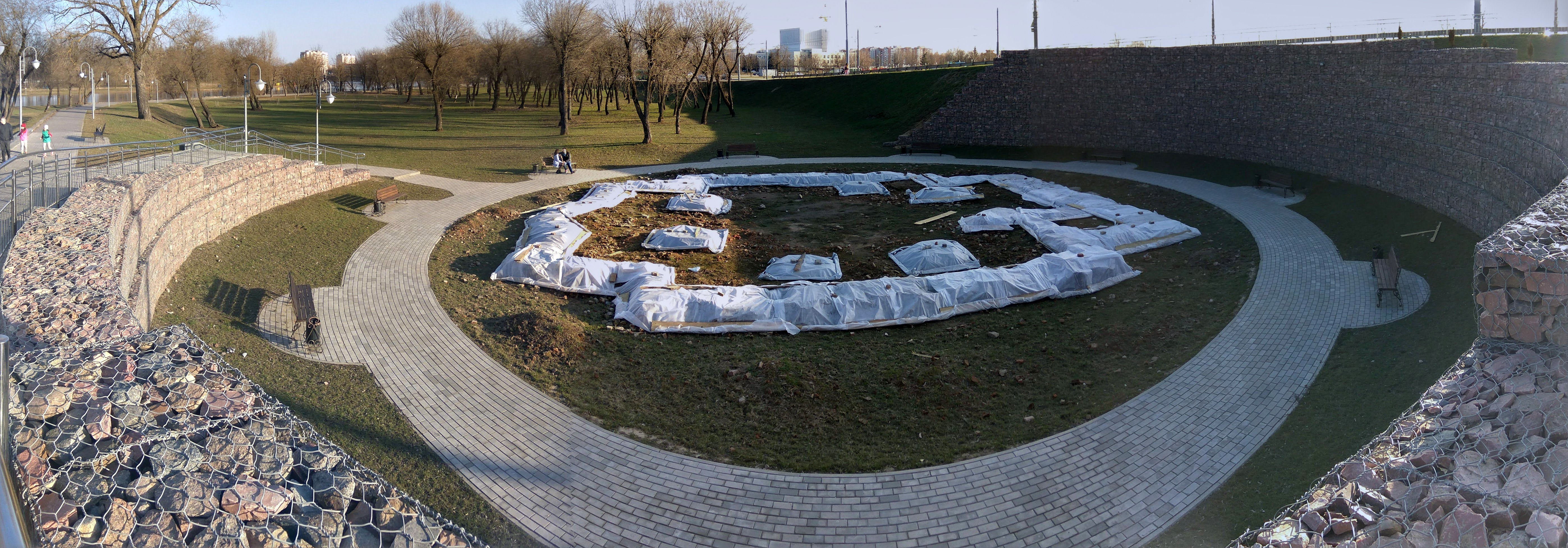 Падмурак Траецкай царквы (Магілёў)